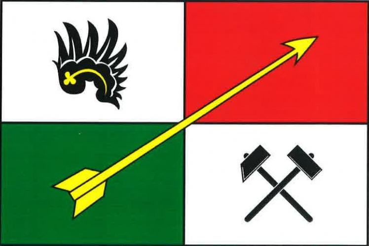 vlajka, Ruda, okres Žďár nad Sázavou